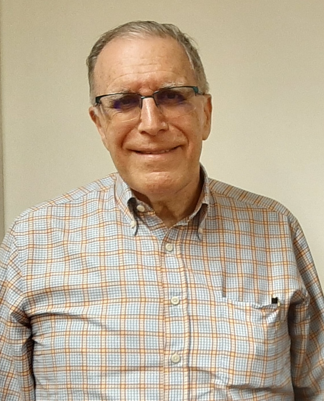 El compositor vasco Sabin López de Guereño. Sabin López de Gereñu compuso la popular canción en Euskera "Ikusi menditzaleak" (Mirad montañeros).